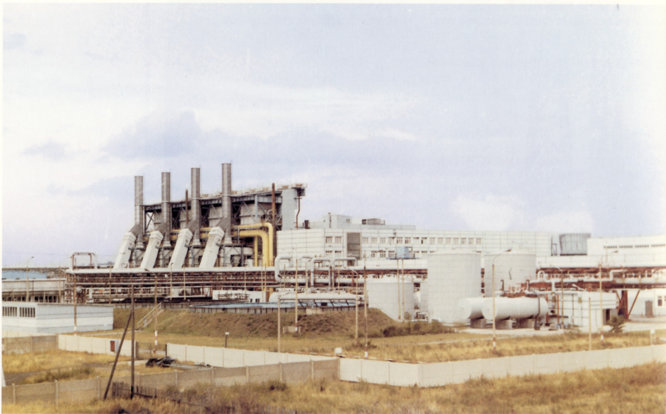 Das 1976 in Betrieb genommene Gaskraftwerk versorgt heute den Chemiepark